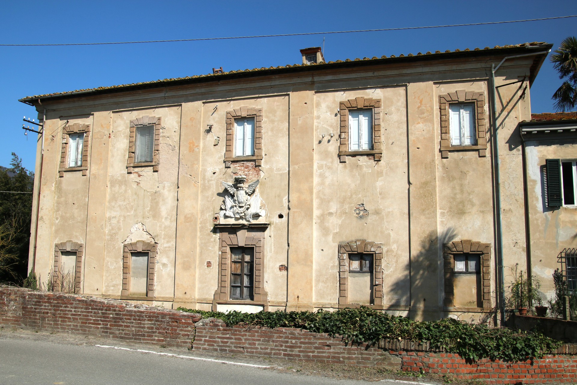 Cateratte Ximeniane in Bocca d’Arno, 1757-1763, progetto di p. Leonardo Ximenez, incaricato dal granduca-imperatore Francesco Stefano di Lorena.